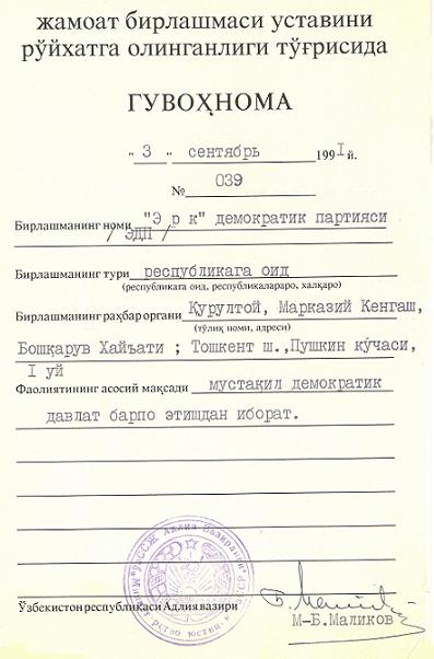 «Erk» Partisinin Özbekistan Adalet Bakanlığınca kayıttan geçirildiğine dair Kayıt Belgesi’nin suratı.